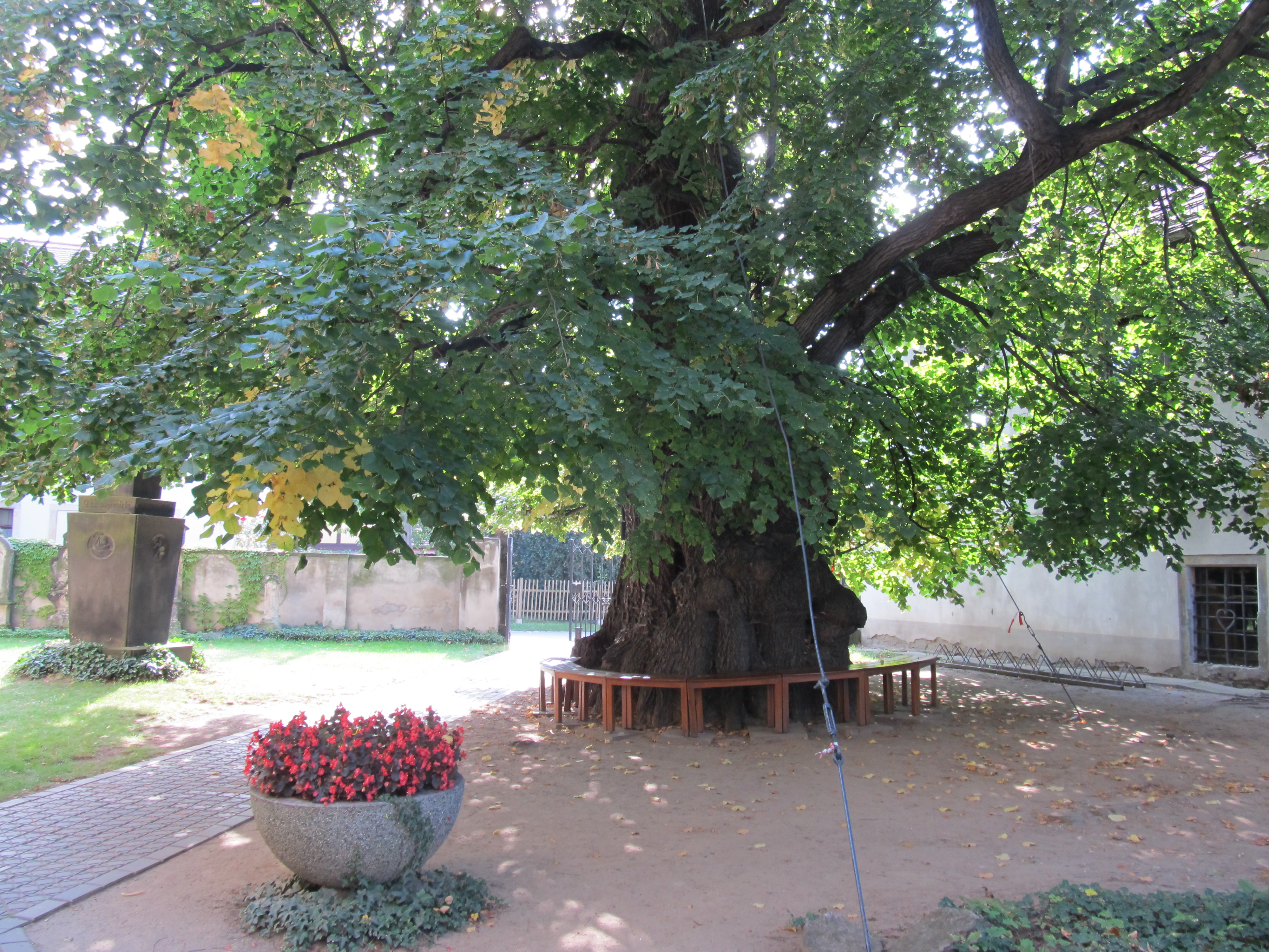 Kaditzer Linde, Dresden, Standort/Boden